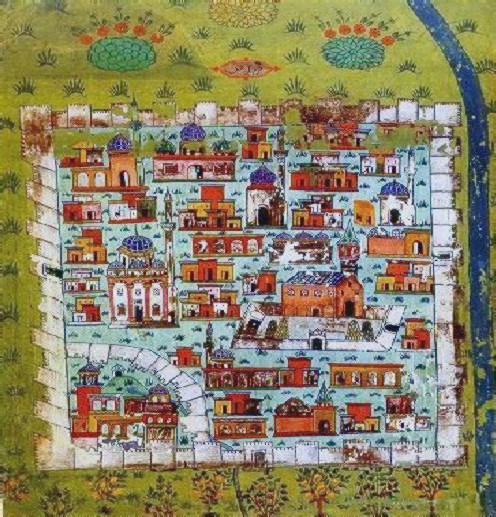 Map of Diyarbekir by Matrakci Nasuh